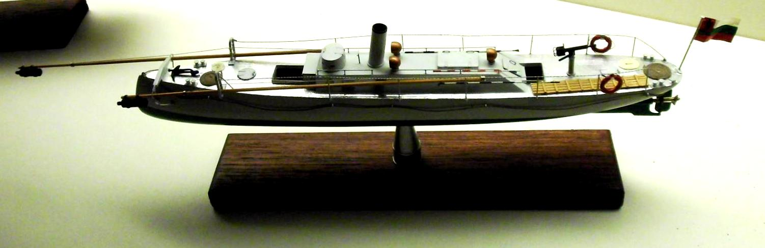 Modell eines Torpedobootes mit Spierentorpedos im Internationalen Maritimen Museum, Hamburg